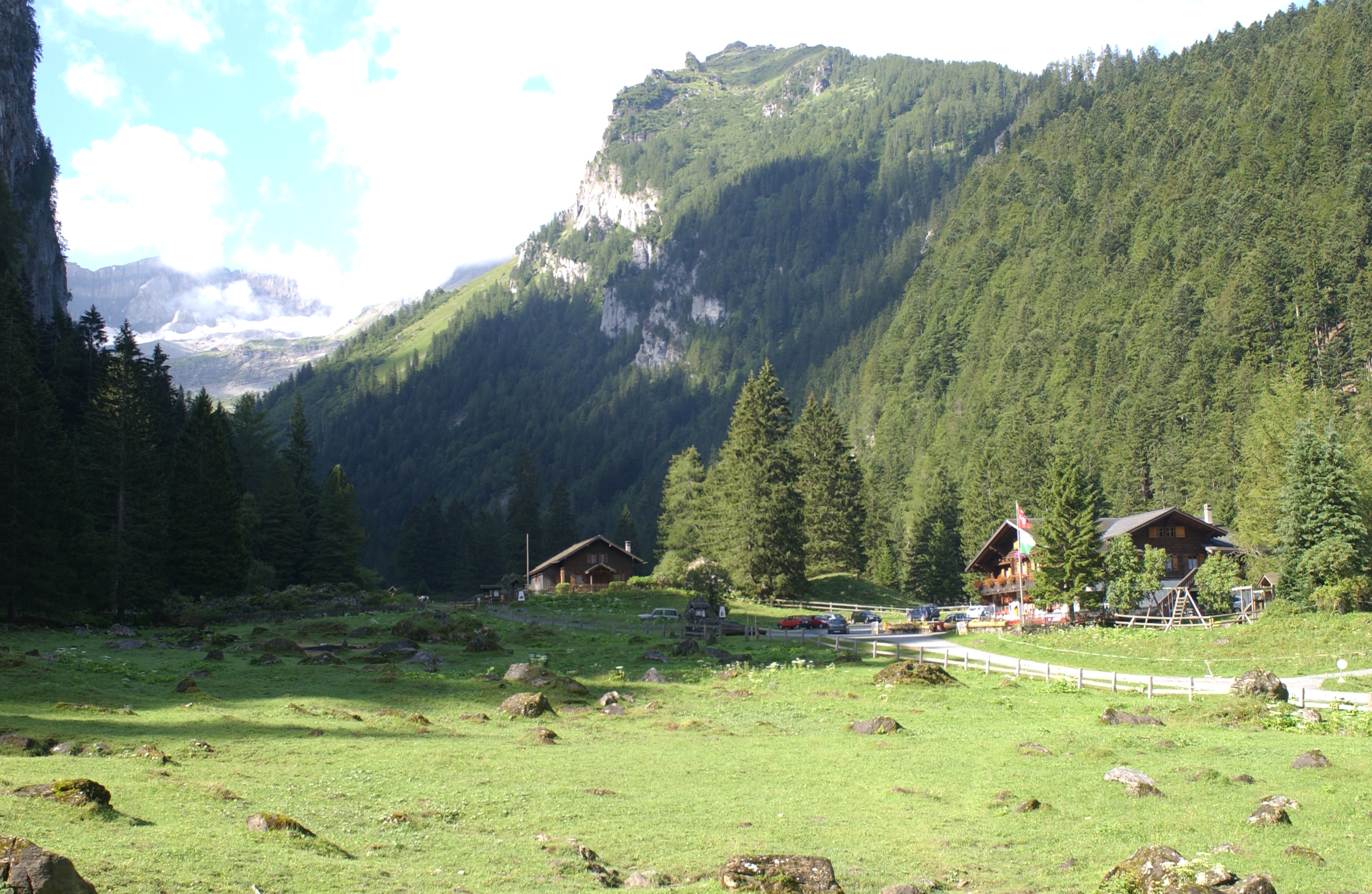 Pont de Nant situé dans le District franc fédéral du Muveran et à l'entrée de la réserve du vallon de Nant, Bex, Vaud, Suisse, août 2002.